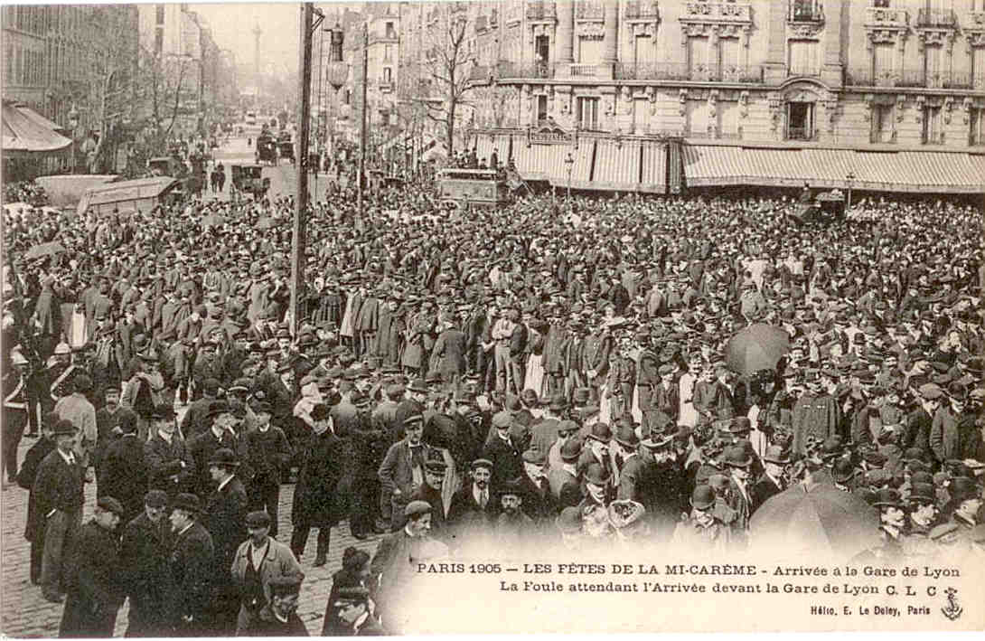 La foule attendant les reines italiennes a la gare de Lyon en 1905